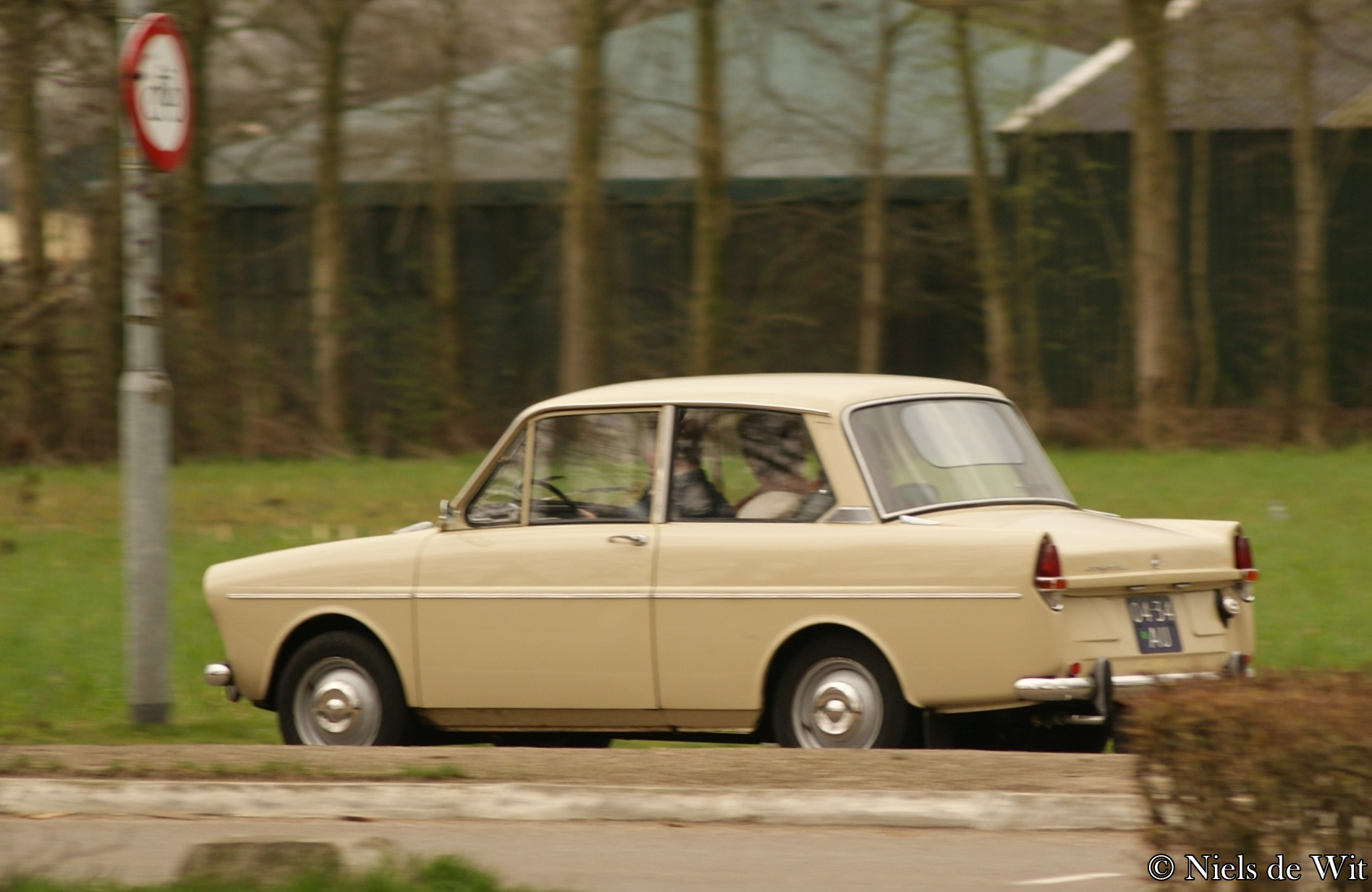 04-34-AU Postweg, Luntere